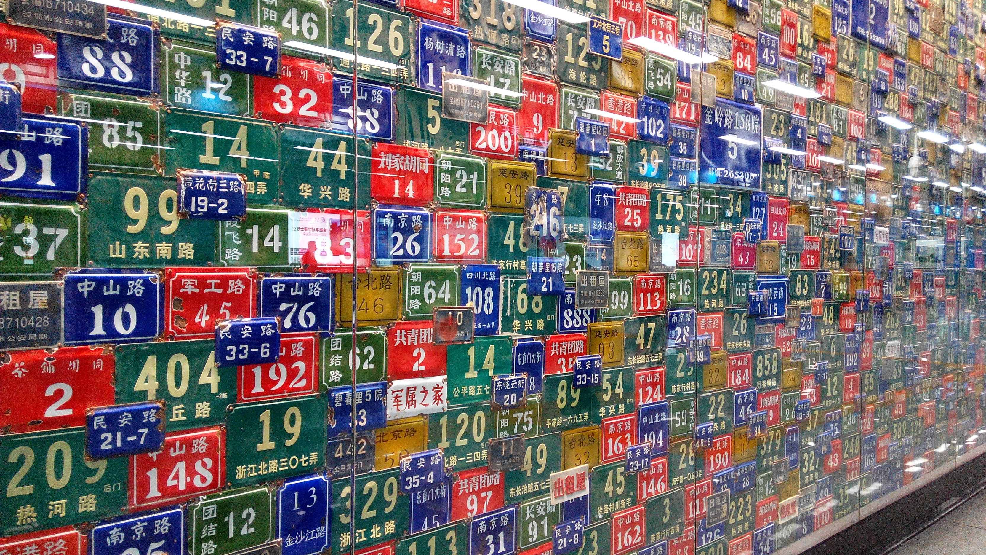 深圳地铁9号线 香梅站站厅文化墙